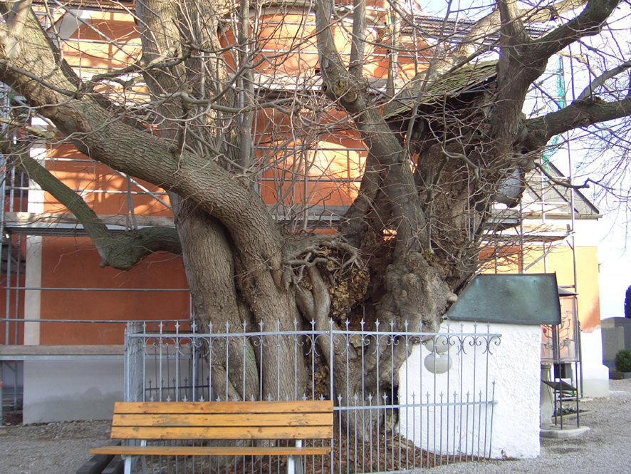 Edignalinde, Westseite